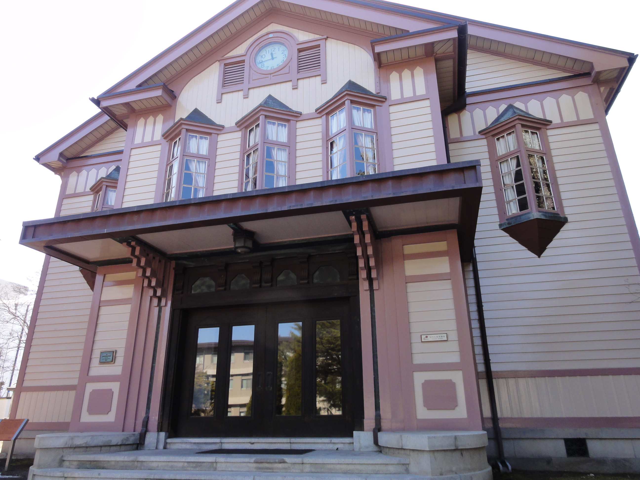 1929年に上田蚕糸専門学校の講堂として建築され、現在は信州大学繊維学部講堂として利用されている。